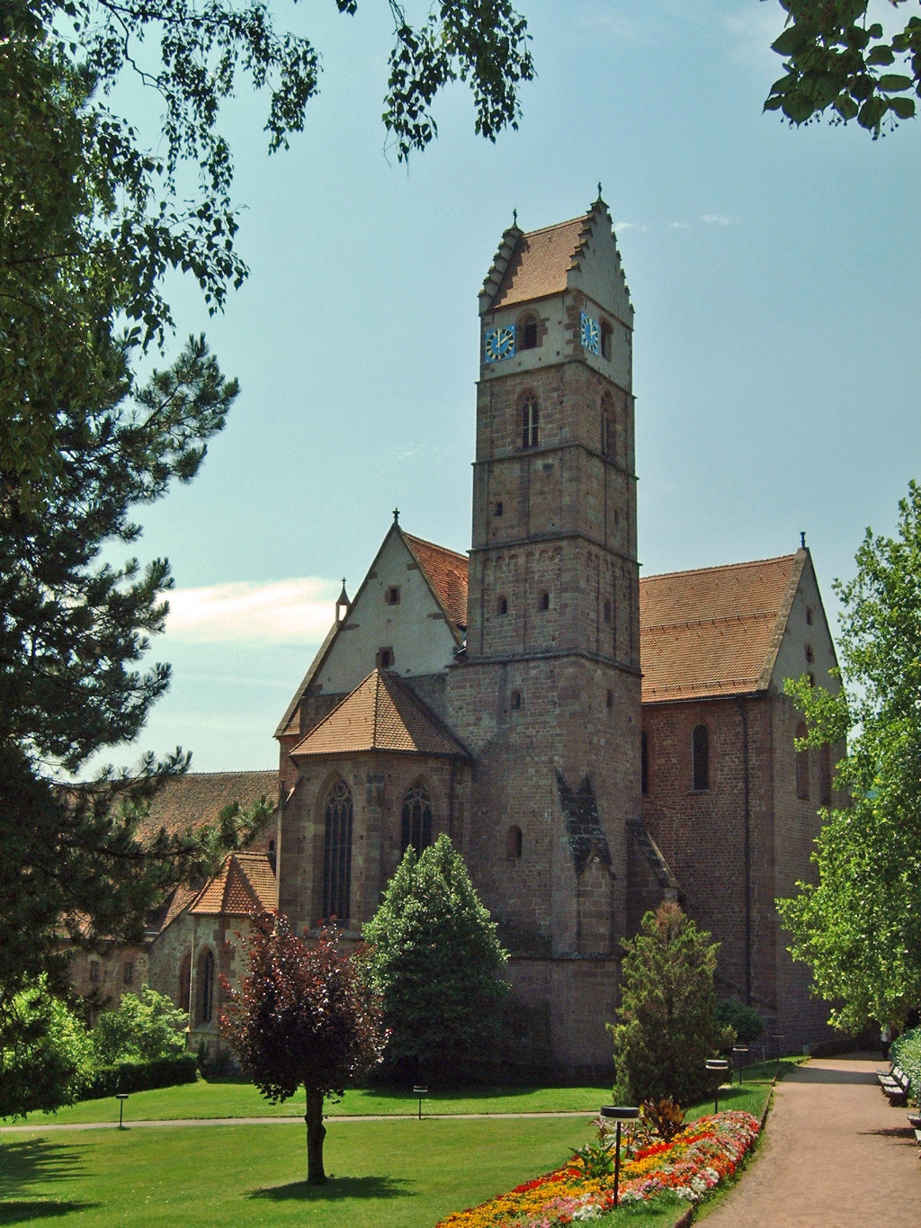 Klosterkirche in der Stadt Alpirsbach